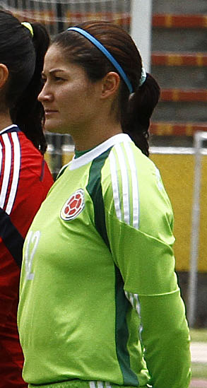 Quito, 28 sep (Andes).- La selección brasileña femenina de fútbol se proclamó Campeona de la Copa América de Fútbol Ecuador 2014. Foto: Micaela Ayala V./Andes